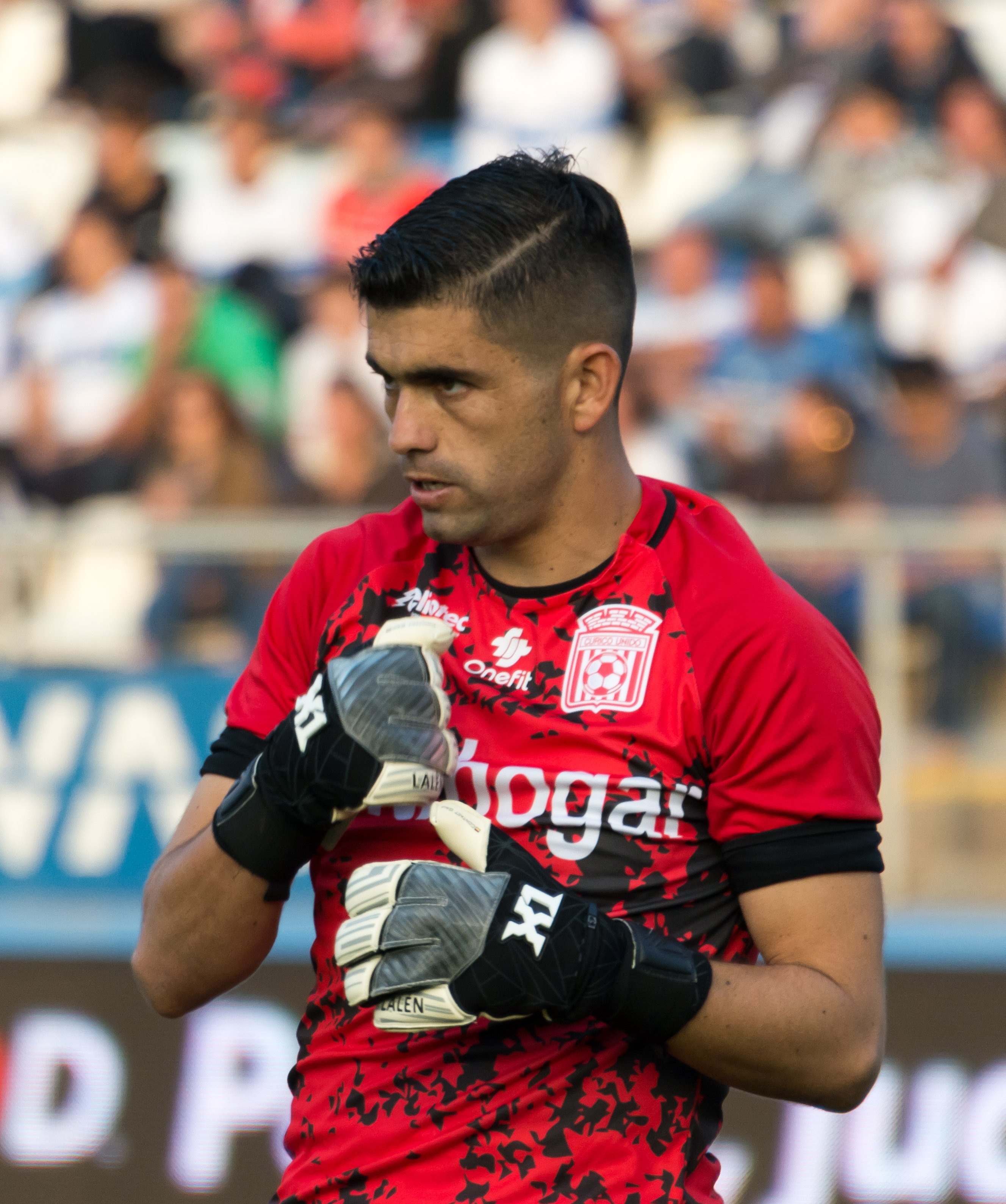 Luis Santelices, Universidad Católica v Curicó Unido, Estadio San Carlos de Apoquindo, Las Condes, Santiago, Región Metropolitana, Chile.